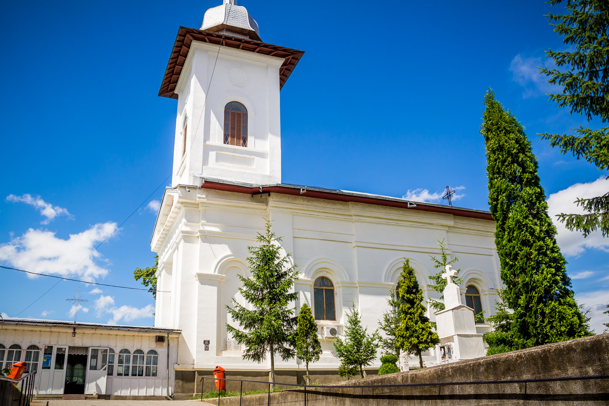 Biserica „Sf. Nicolae”